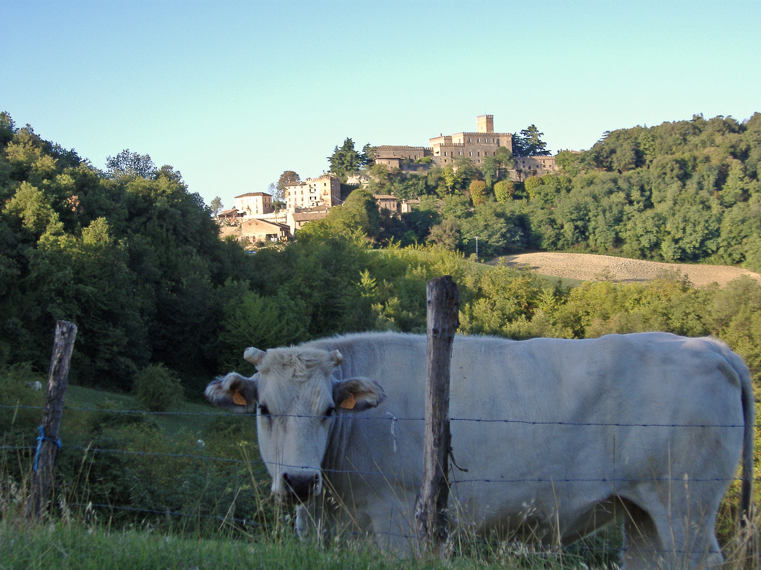 Panorama Tabiano Terme